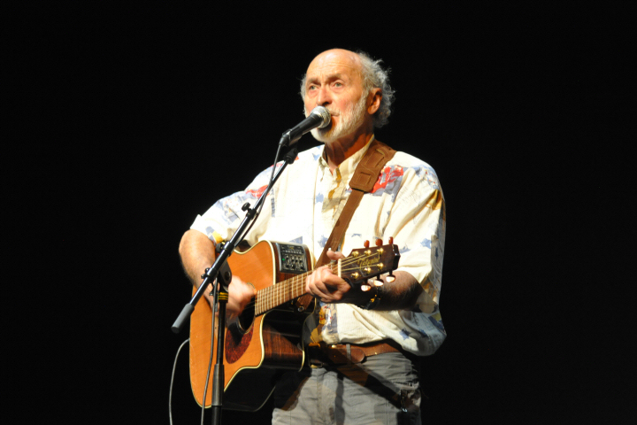 François Budet, en concert à Plouha le 28 juillet 2012.